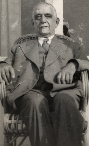 portrett, mann, døveprest, sittende knefigur.